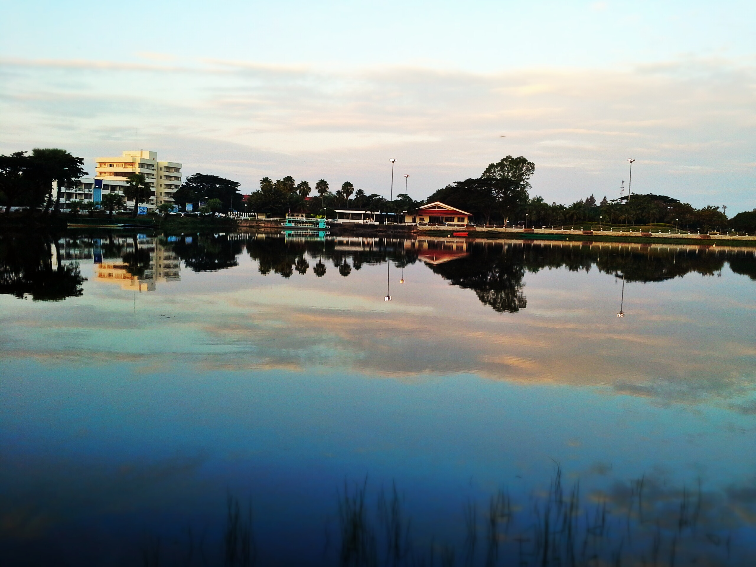 หนองหาน สกลนคร